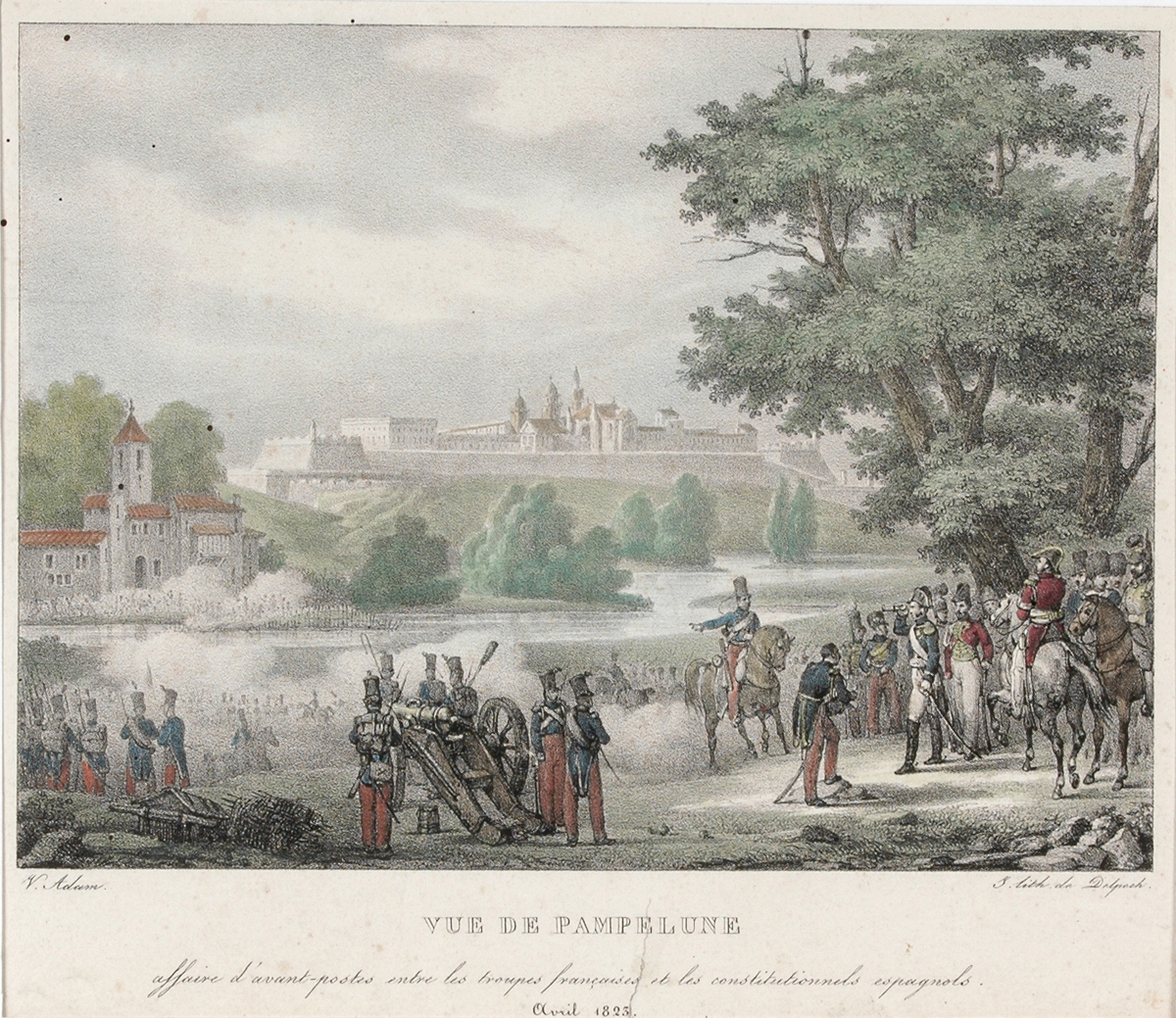 Vista de la ciudad de Pamplona durante el asedio de 1823. Ilustración por Victor Adam.